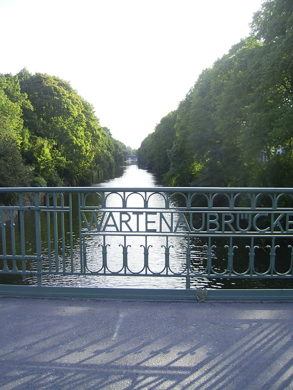 Blick von der Wartenaubrücke nach Osten in den Eilbekkanal. Links befindet sich der Stadtteil Uhlenhorst und rechts der Stadtteil Eilbek. Der Kanal bildet die Stadtteilgrenze.